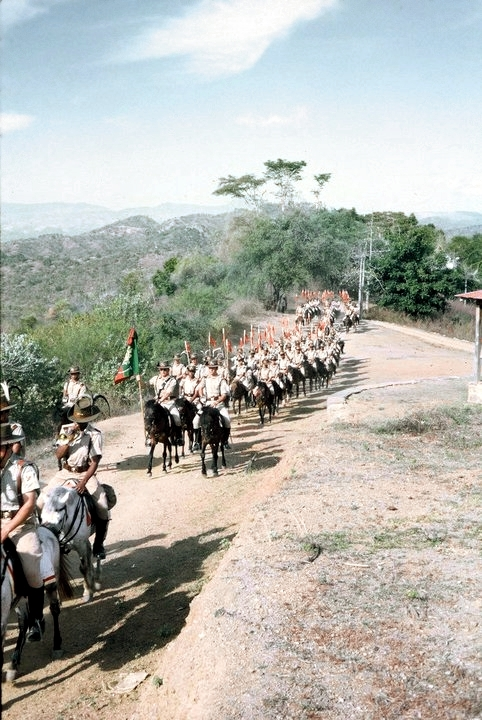 Formatura do Esquadrão com o Estandarte Nacional a caminho de Huato Buicari